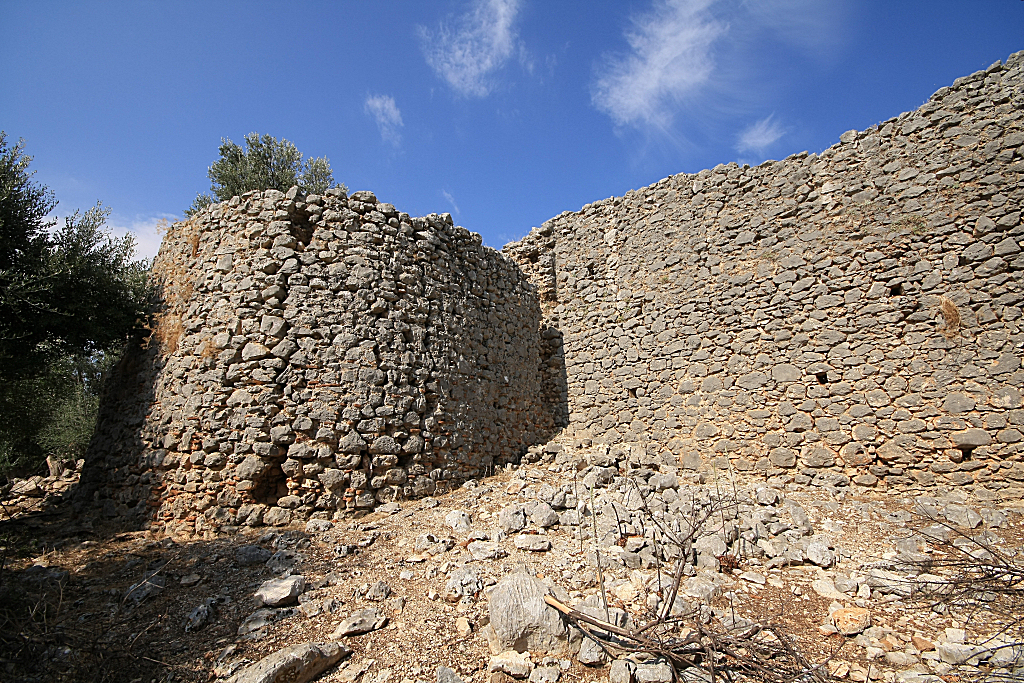 Πύργος στο βυζαντινό κάστρο στο Βάρνακα.